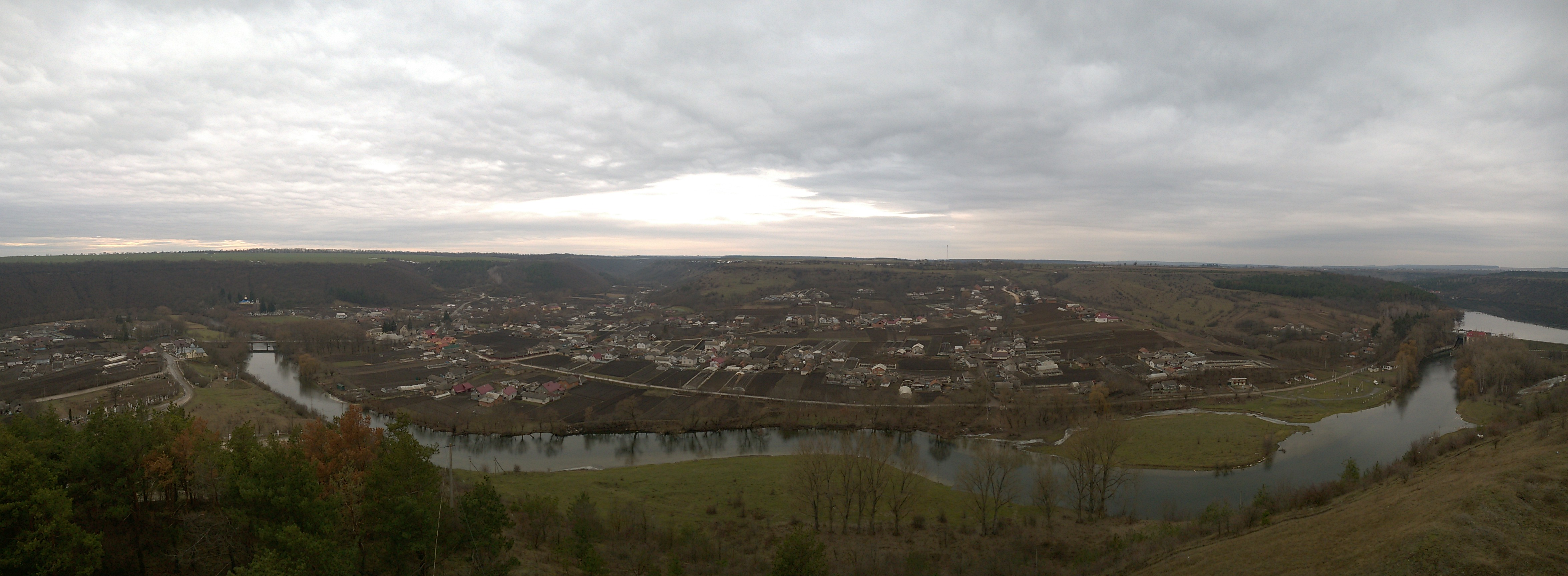 Село Касперівці і річка Серет